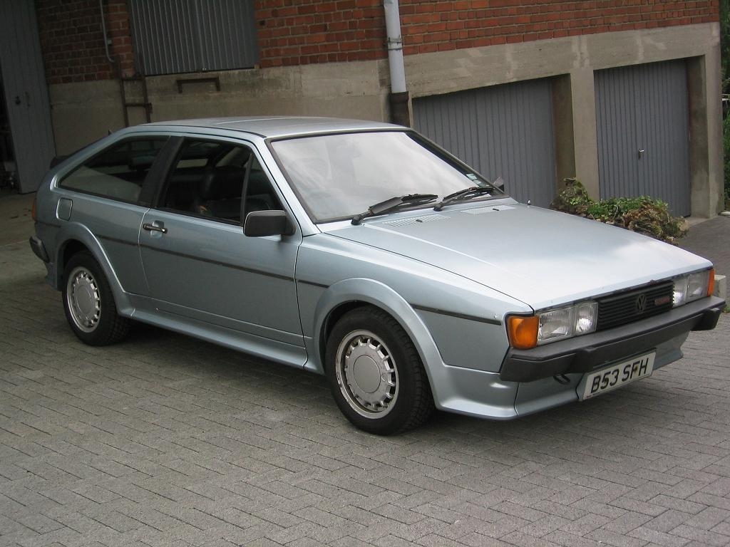 Scirocco Storm Sondermodell (England)